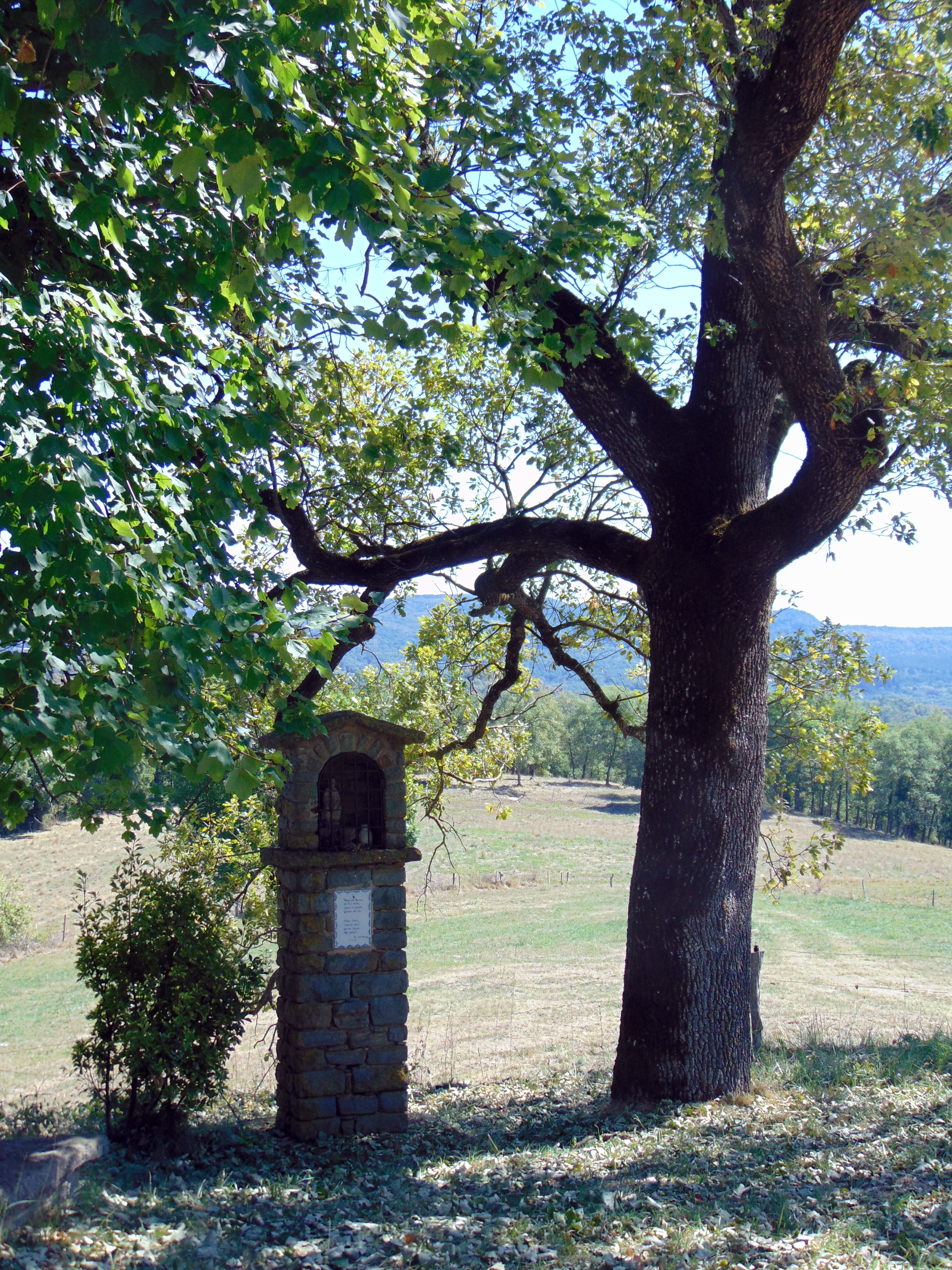 El Bach de Collsacabra (Rupit i Pruit)